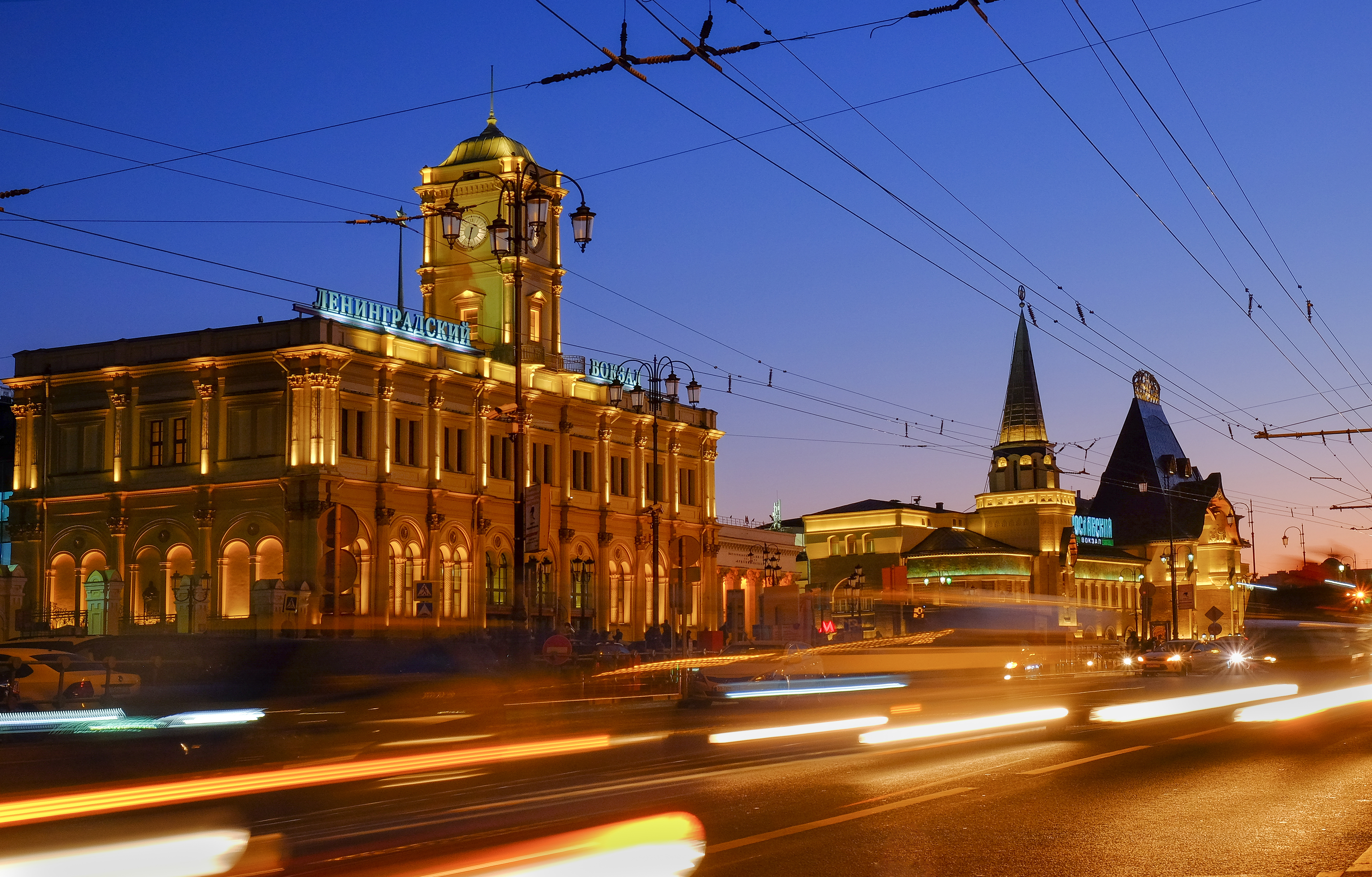 Stasiun Leningradsky di Moskwa saat menjelang matahari terbit, stasiun ini berada di kawasan Komsomolskaya Square, melayani perjalanan ke St. Petersburg hingga jurusan international, antara lain ke Tallin, Helsinski, hingga Estonia Finlandia.